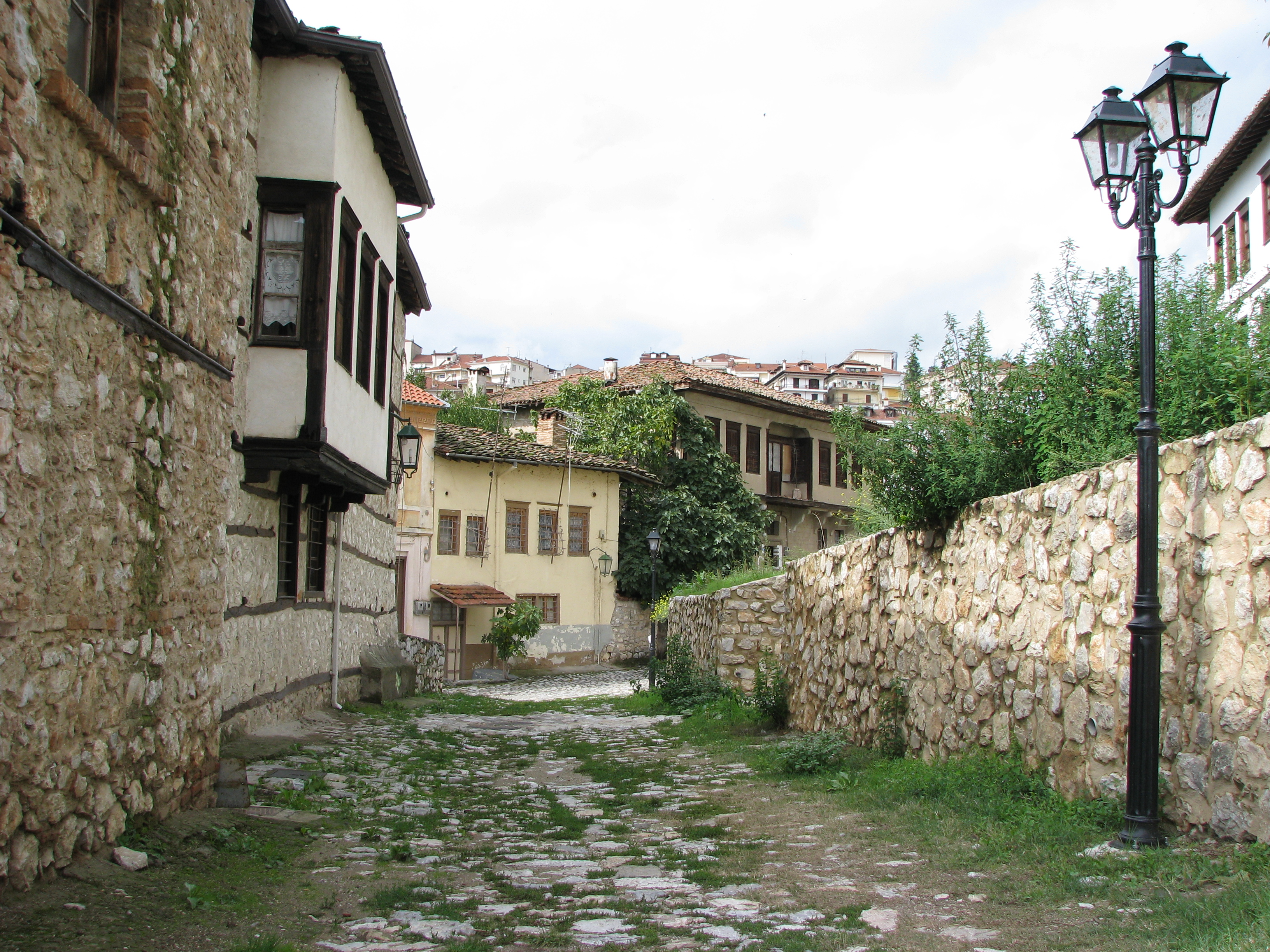 Старият град в Костур, Егейска Македония, Гърция.